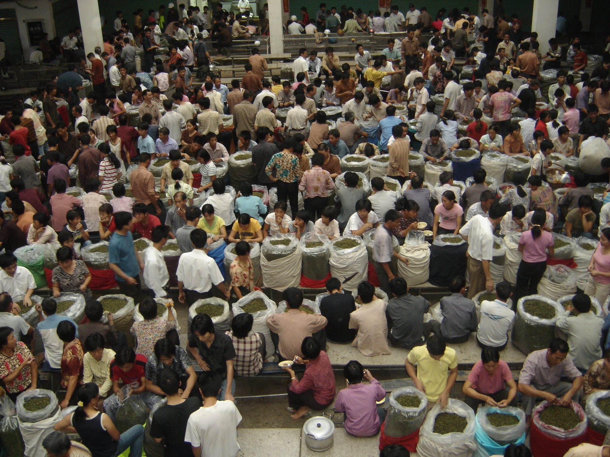 茶都趕早市的茶農